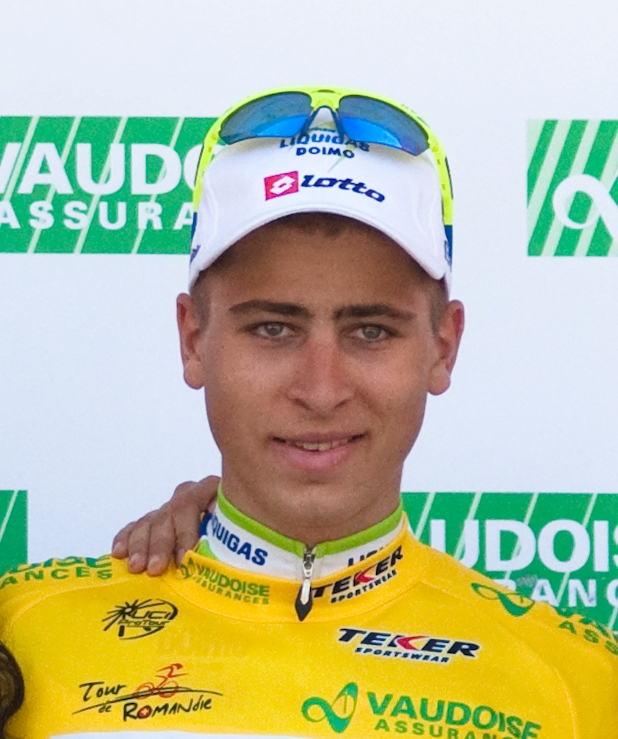 Peter Sagan na závodě Kolem Romandie v roce 2010.